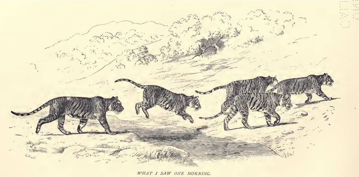 5 Tigers seen